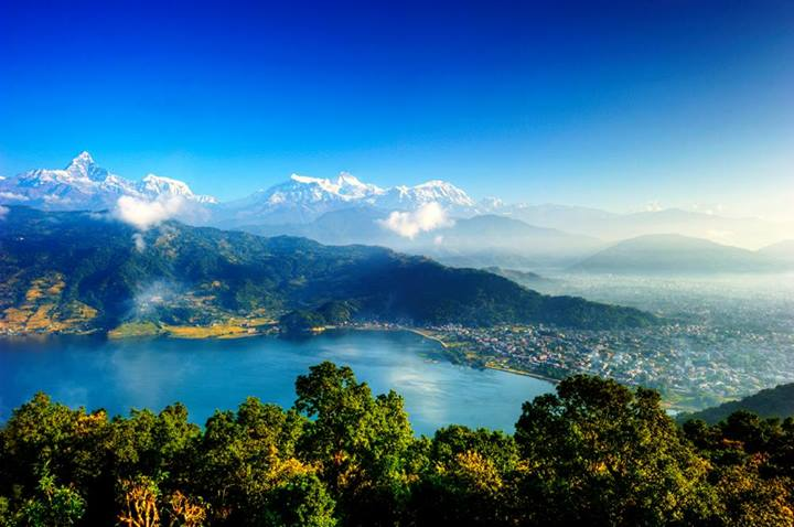 Overview of fewa lake.